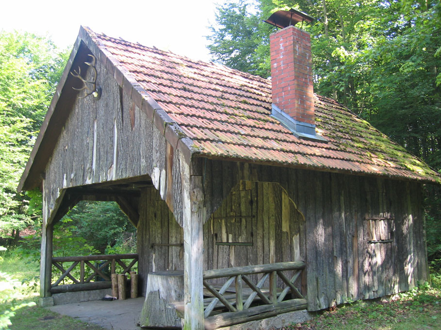 Das Kutschenhäuschen im Dirlammer Wald